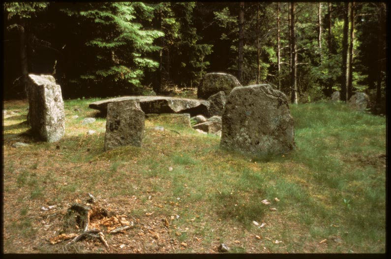 Dös i stensättning. "Påls hus", Svenneby 118:1. Motiv: Svenneby 118:1 Kategori: Stenkammargrav Dös i stensättning. "Påls hus", Svenneby 118:1. Svenneby 118:1.